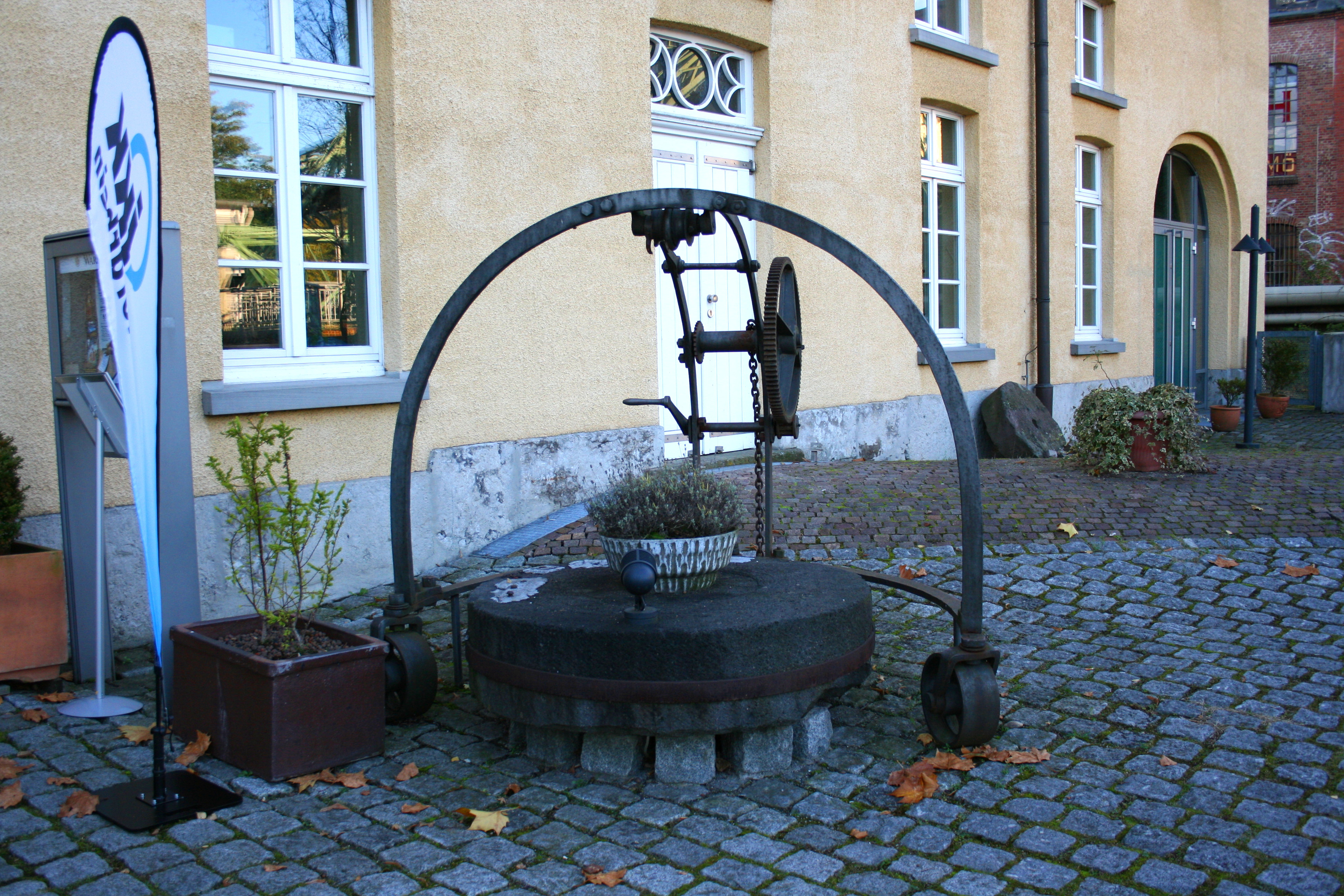 Cleff'sche Mühle in Wuppertal